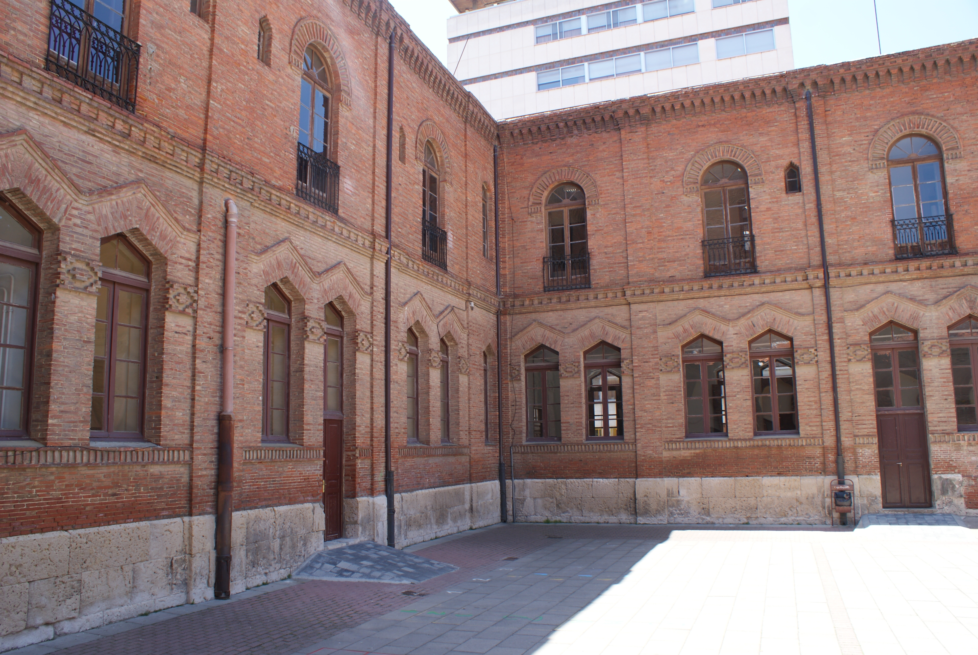 Patio del Colegio Modesto la Fuente, en Palencia (España). Declarado Bien de Interés Cultural.